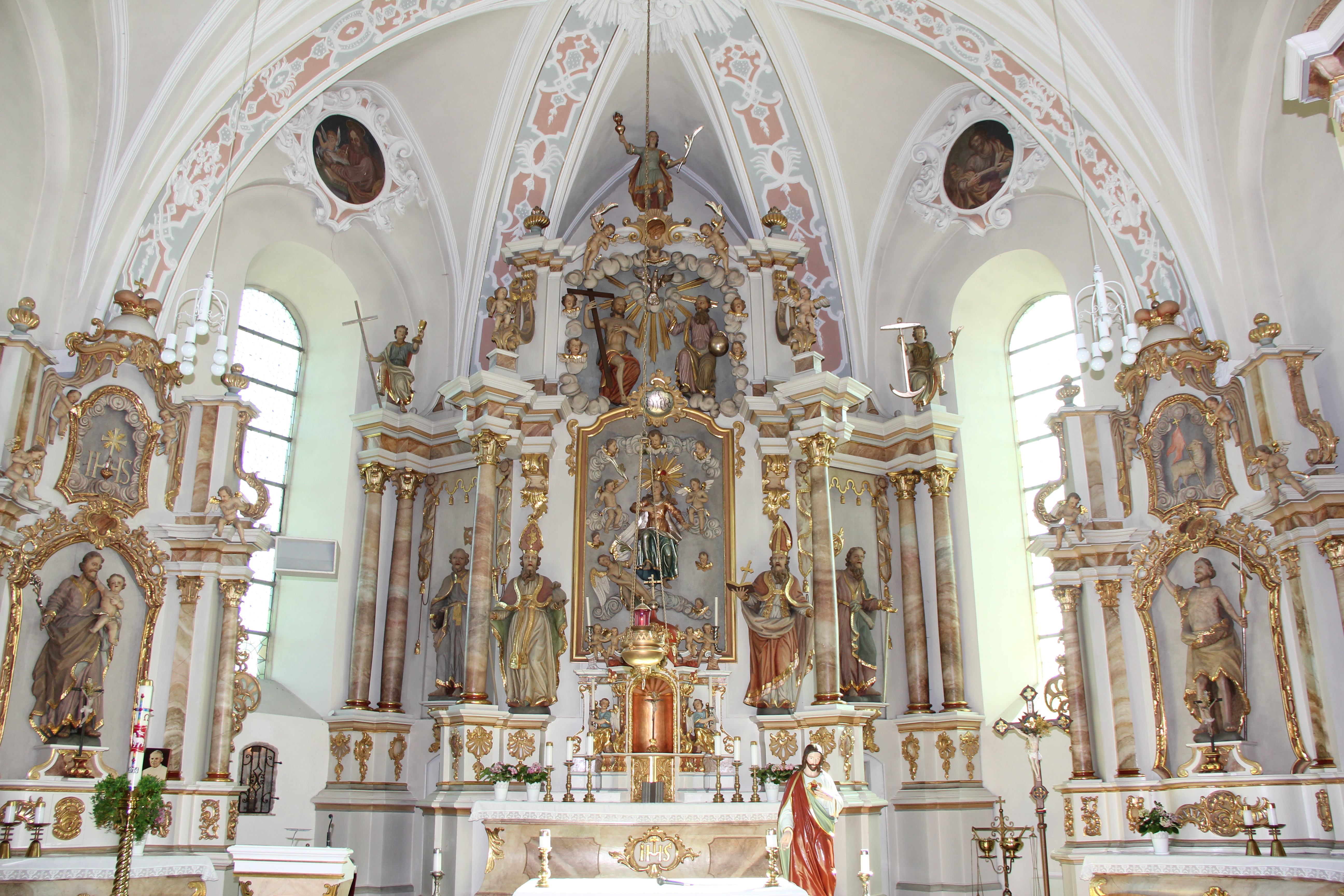 Innenansicht der St. Nikolauskirche in Heuthen